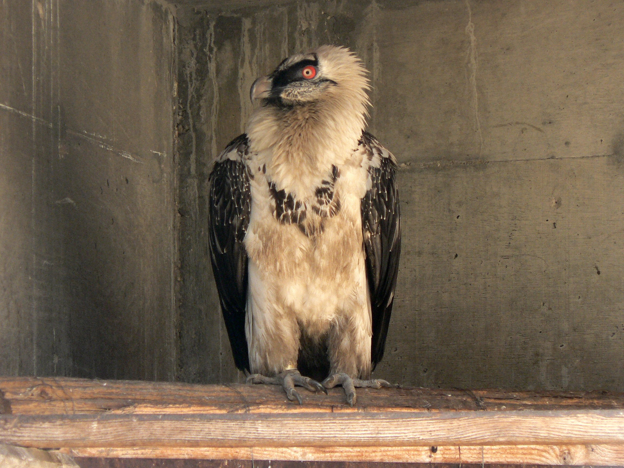 צולם בגן הזואולוגי בת"א Taken in Tel Aviv Zoological Gardens.